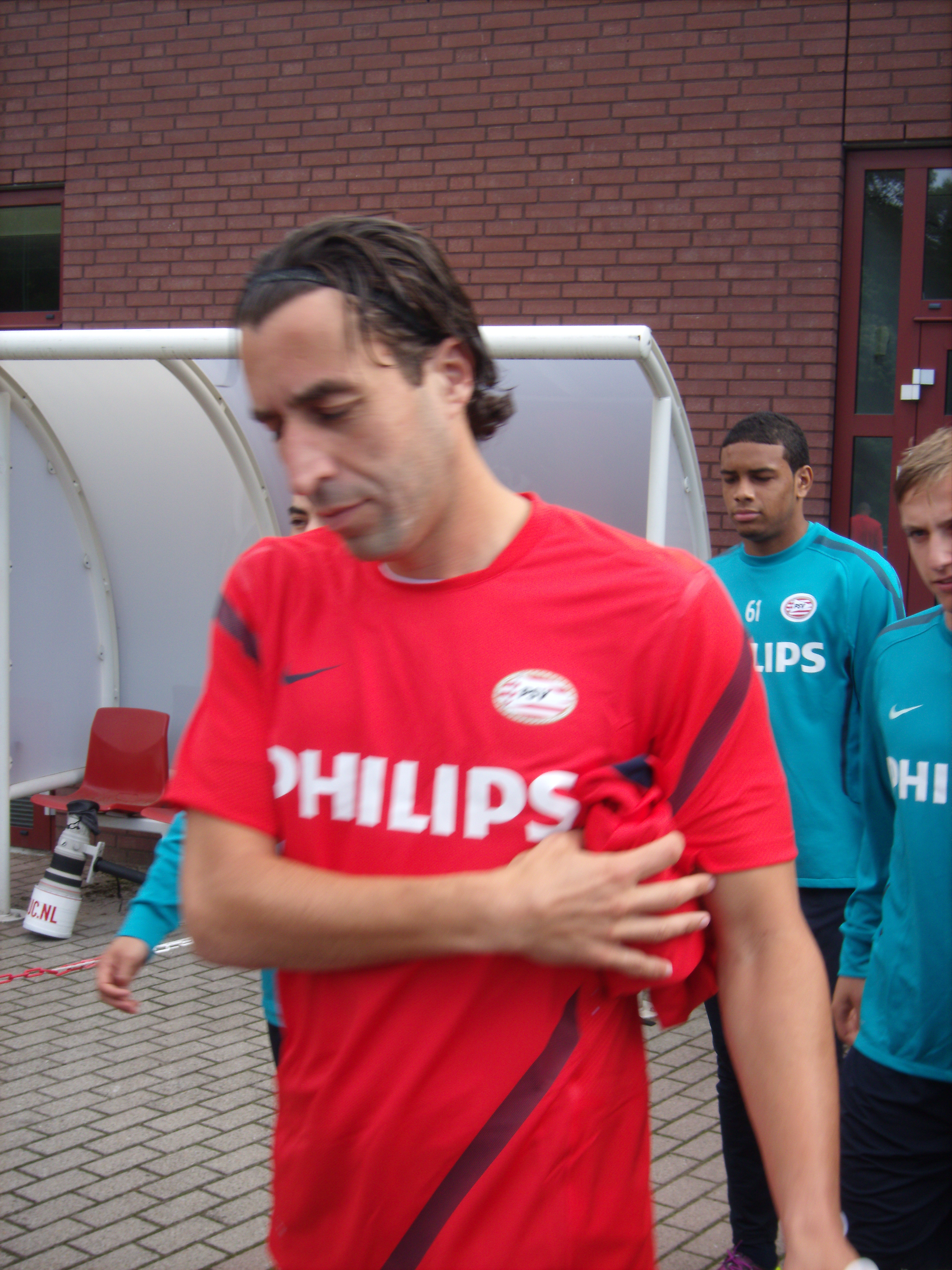 Khalid Sinouh betreedt voor de eerste keer het trainingsveld van PSV